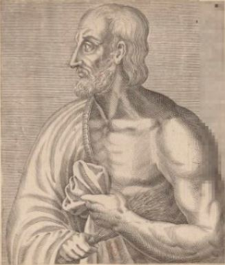 Gravure représentant le duc d'Anjou Foulques de Nerra en buste.